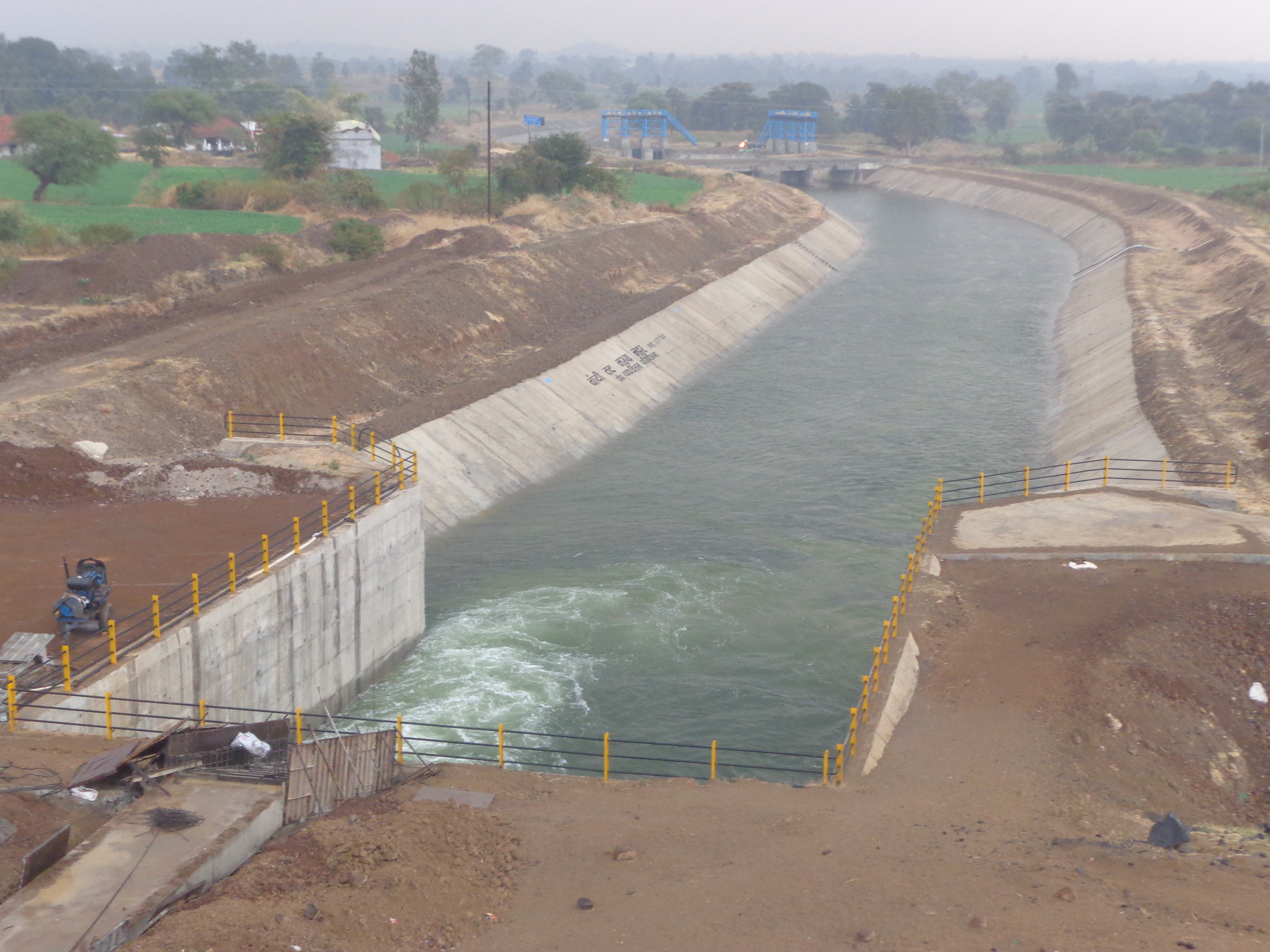 बायी तट मुख्य नहर